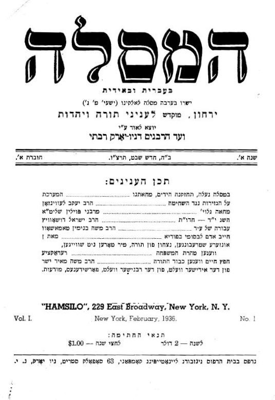 שער ירחון המסלה